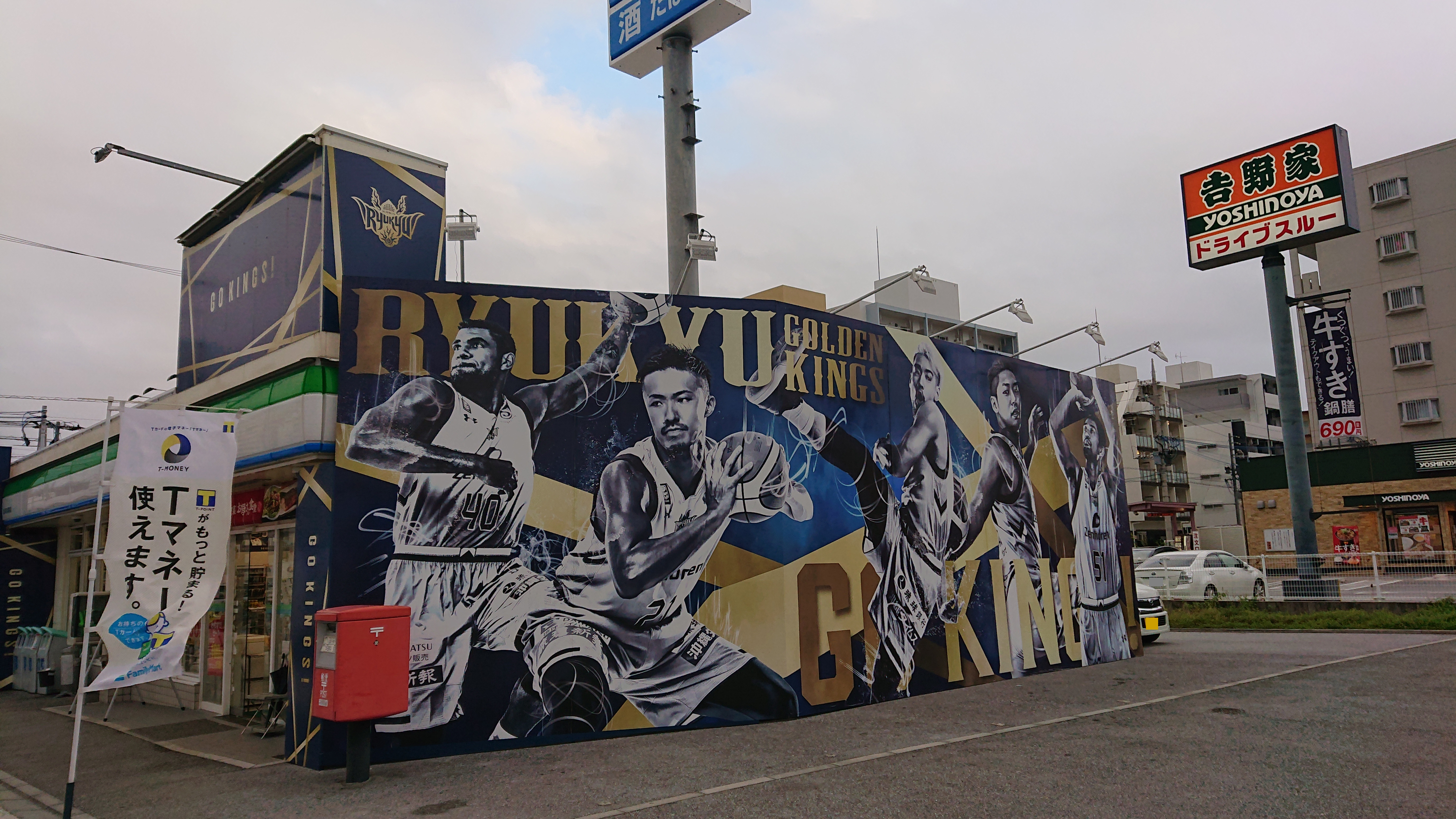 琉球ゴールデンキングスデザインのファミリーマート北谷町役場前店。2019年02月11日撮影。